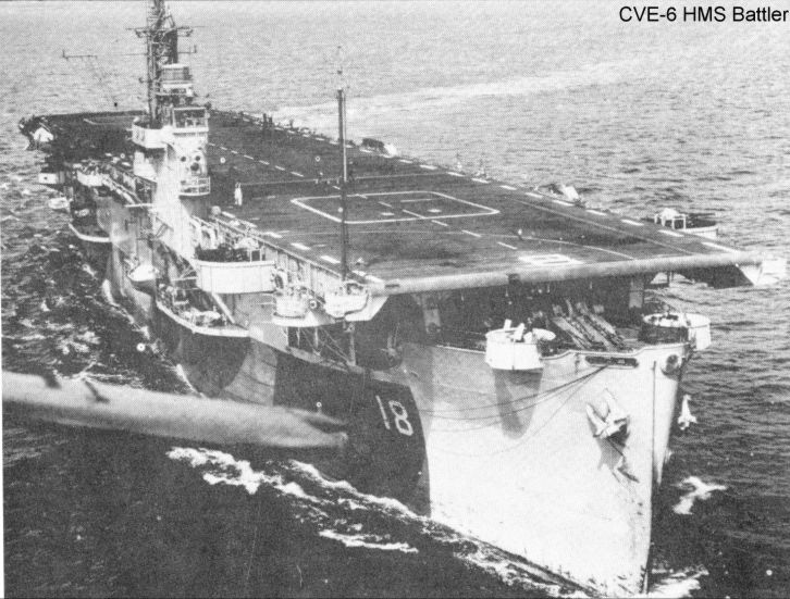 USS Altamaha (CVE-6) / HMS Battler underway